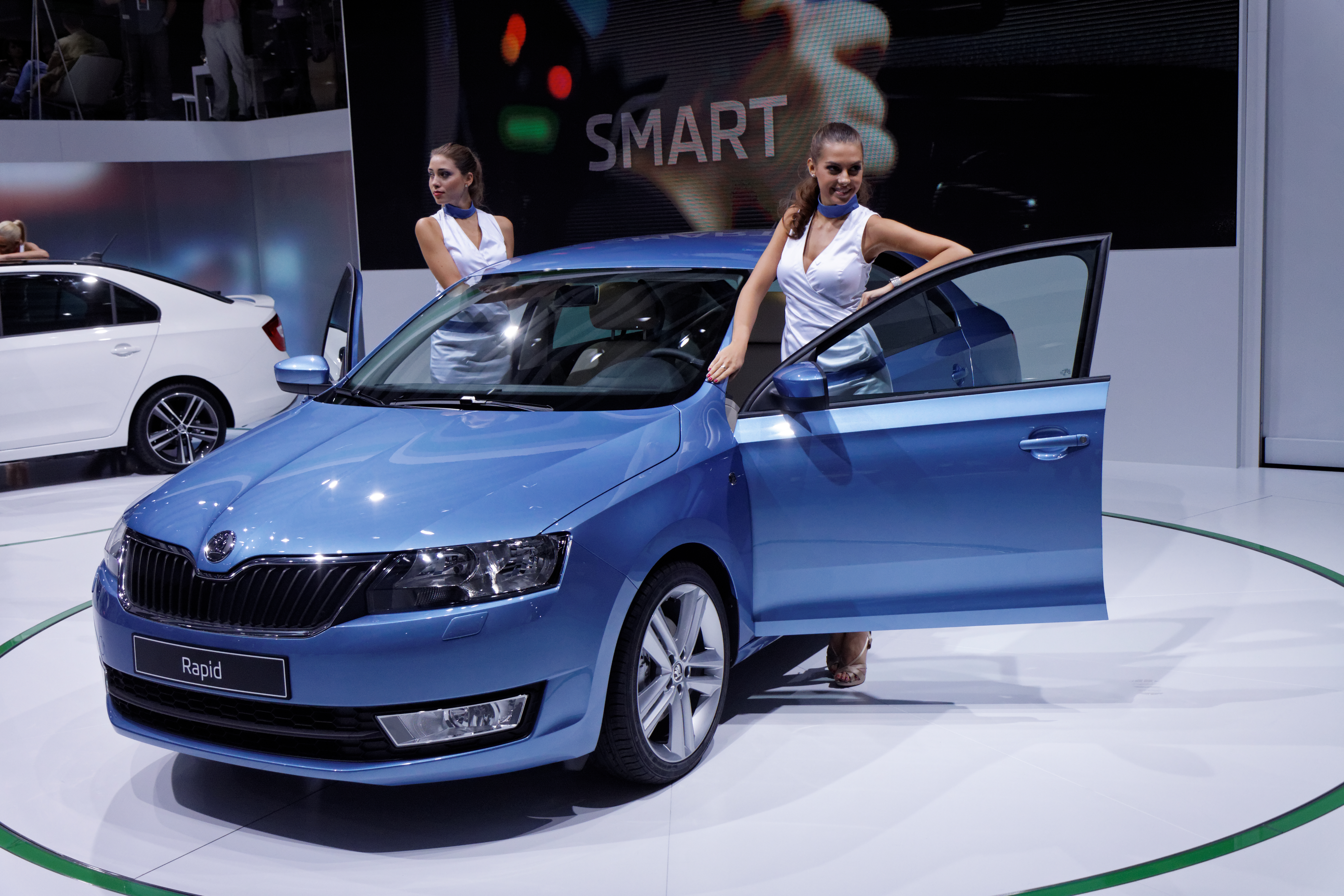 Une Škoda Rapid présentée lors du Mondial de l'Automobile de Paris 2012.